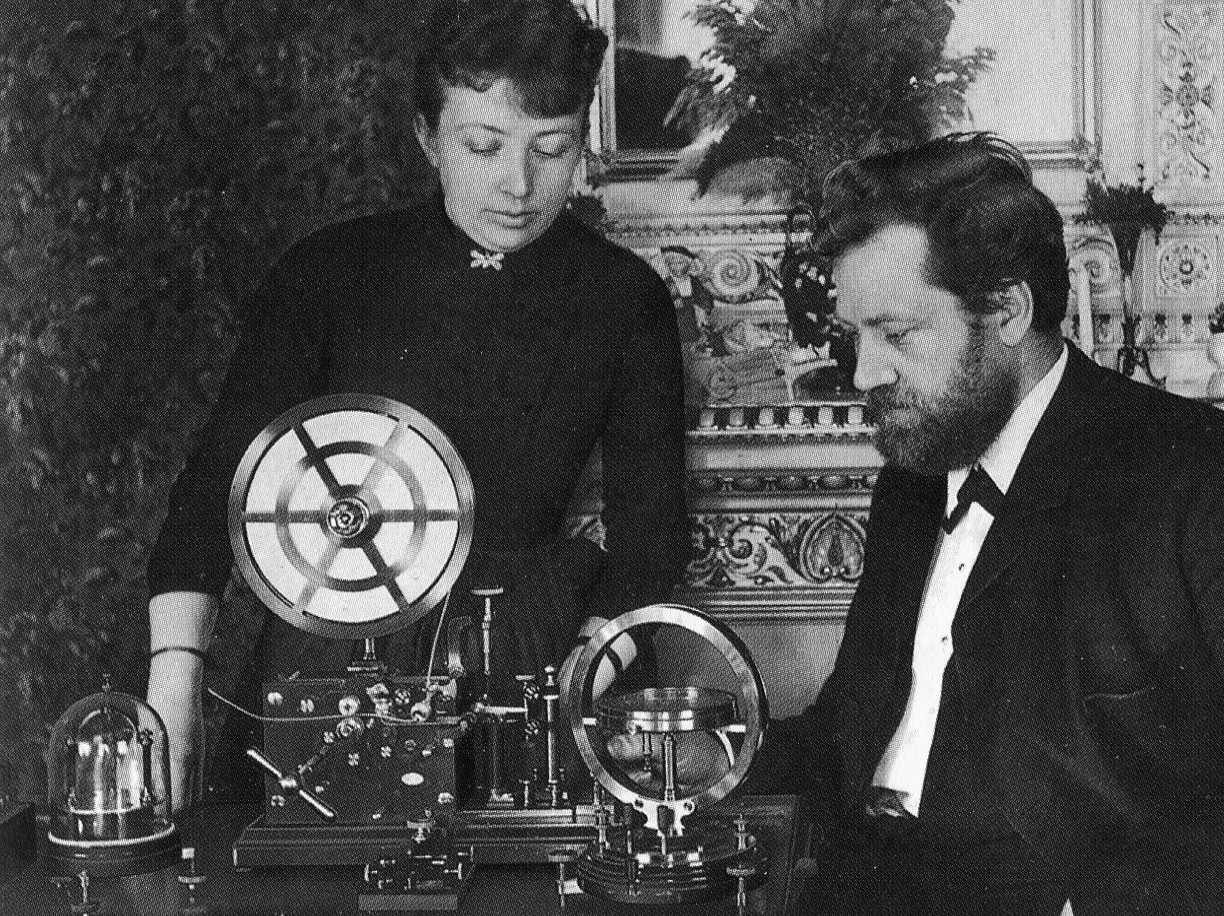 Lars Magnus Ericsson och Hilda Ericsson med teletekniska apparater 1895